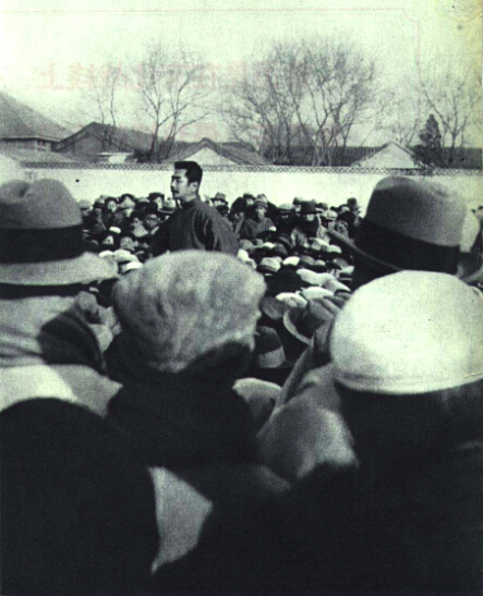 1966-10 鲁迅于1929年在北京对群众讲演。